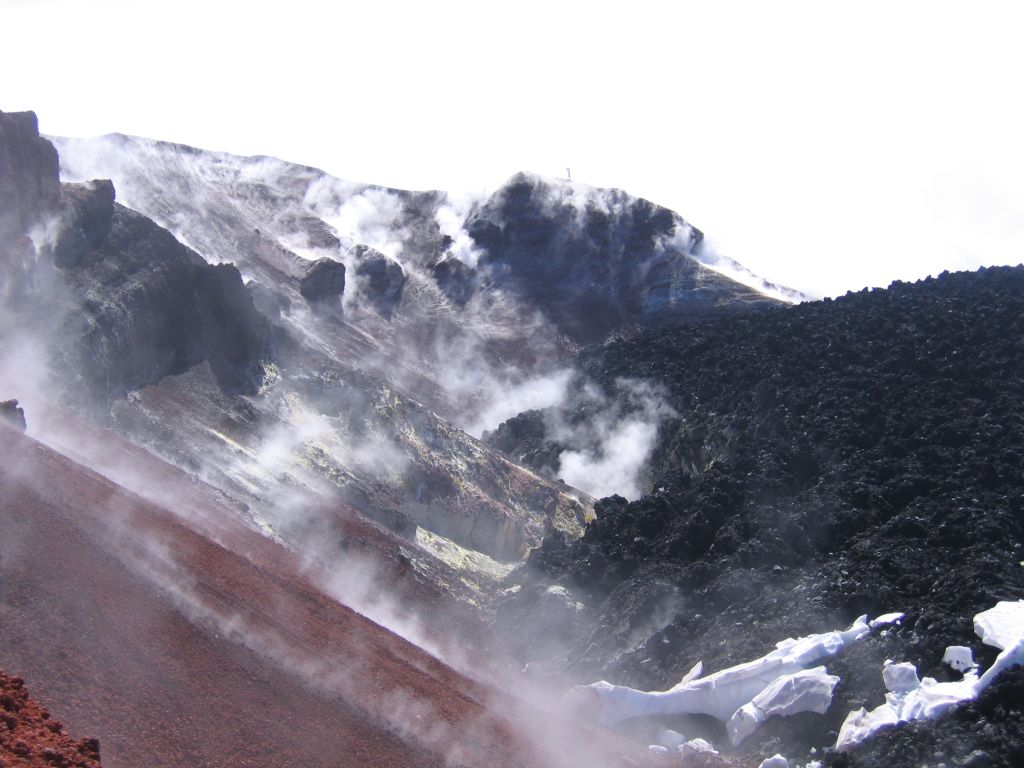 Кратер Авачинской сопки. Türkmençe: Awaça sopkasynyň krateri.